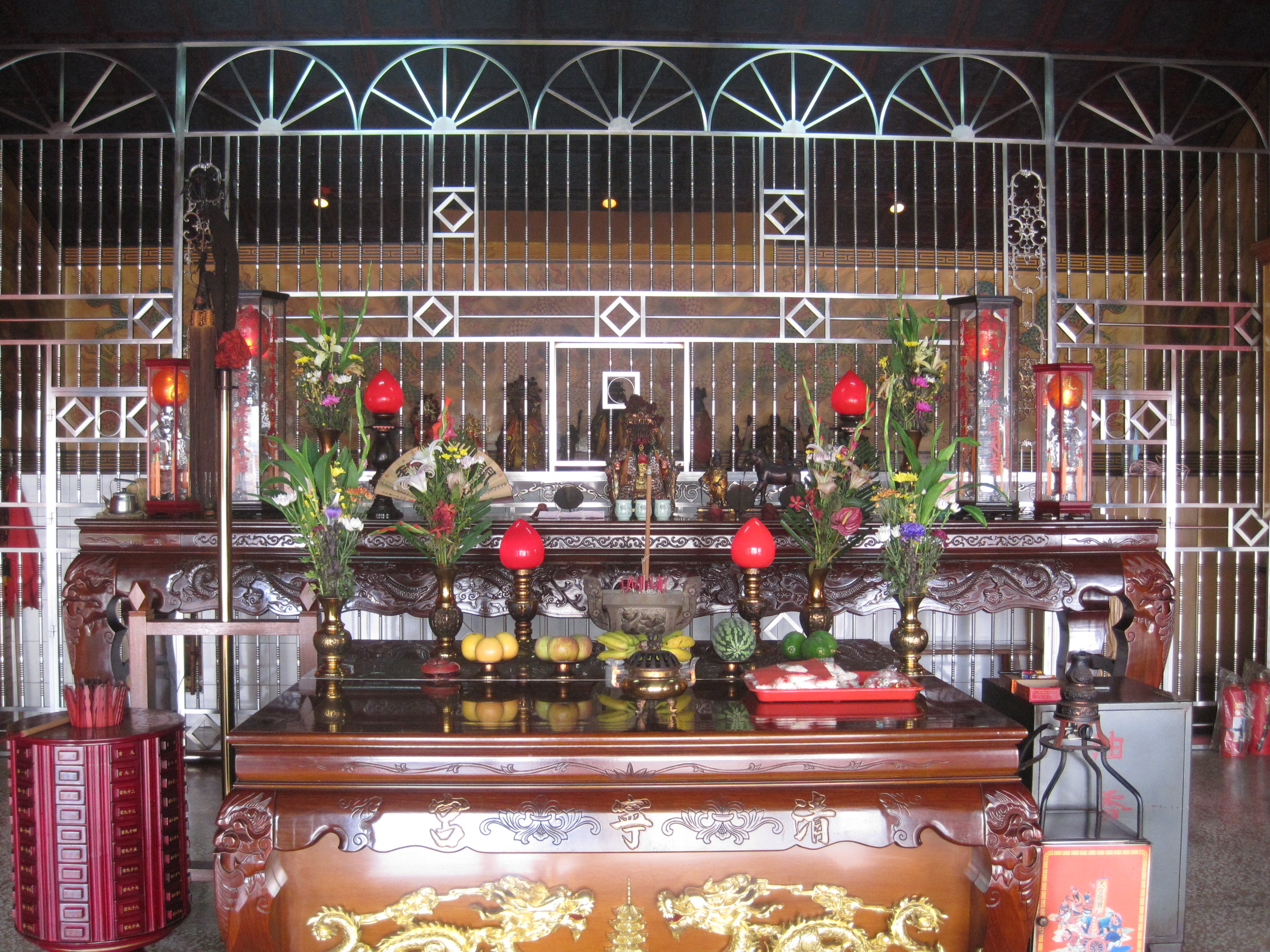 仁德清寧宮內部